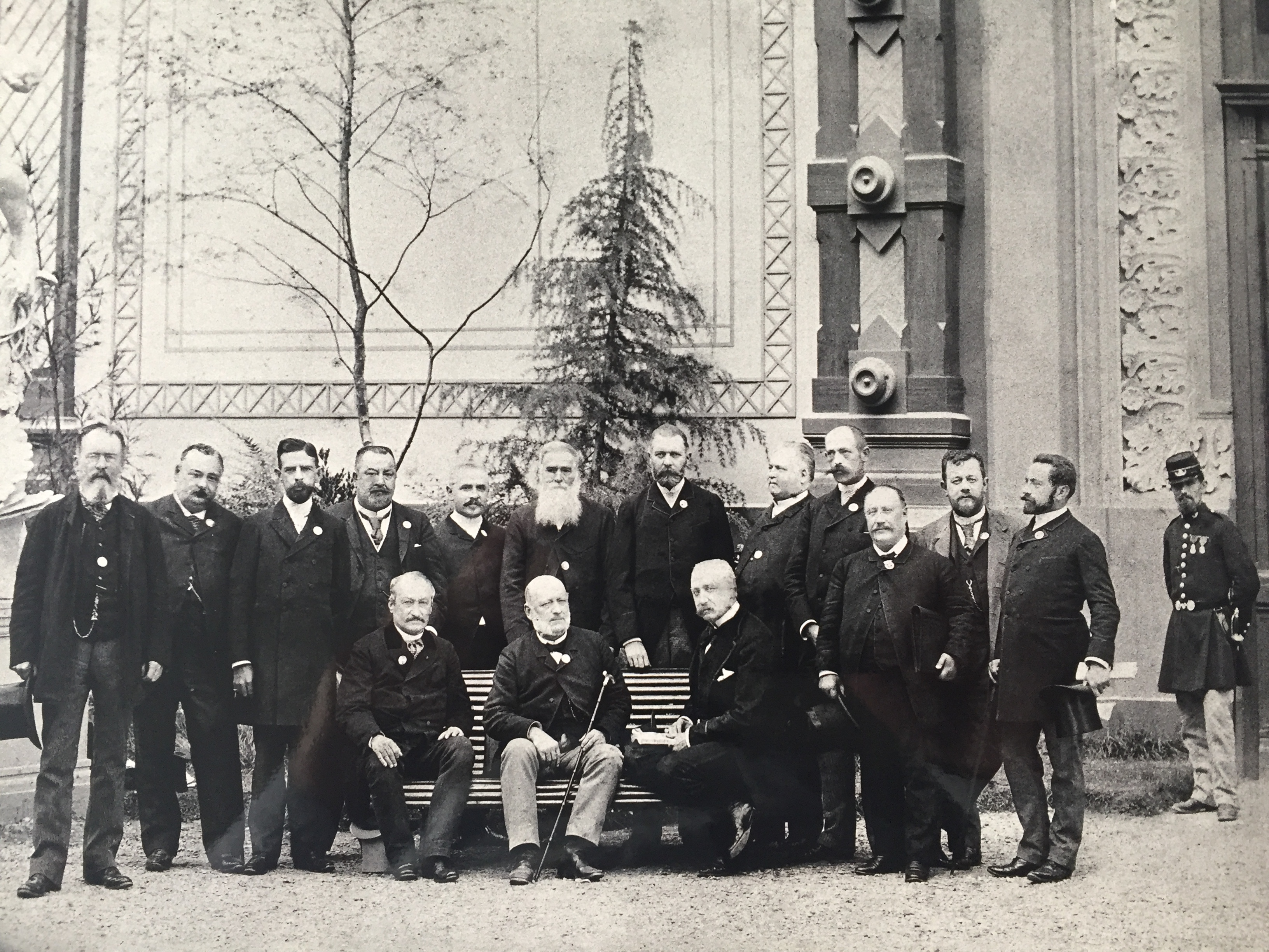 Charles-Adolphe Fortier-Beaulieu au centre. A sa droite Félix Faure et autour de lui les personnalités politiques de l'assemblée nationale ou du gouvernement présentes à l'exposition universelle de 1889